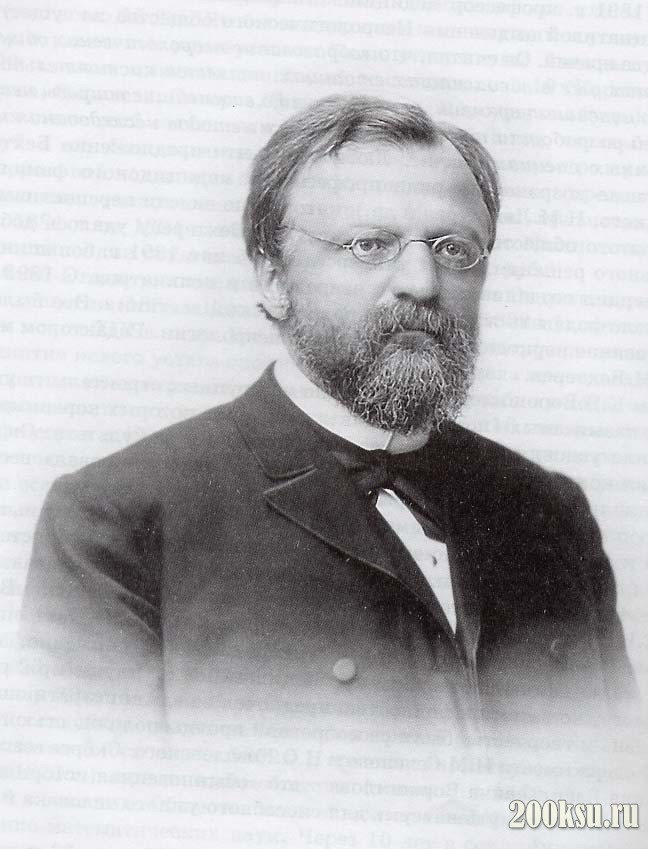 Дмитрий Иванович Дубяго (1849—1918) — русский астроном, тайный советник, ректор Императорского Казанского университета (1899—1905).